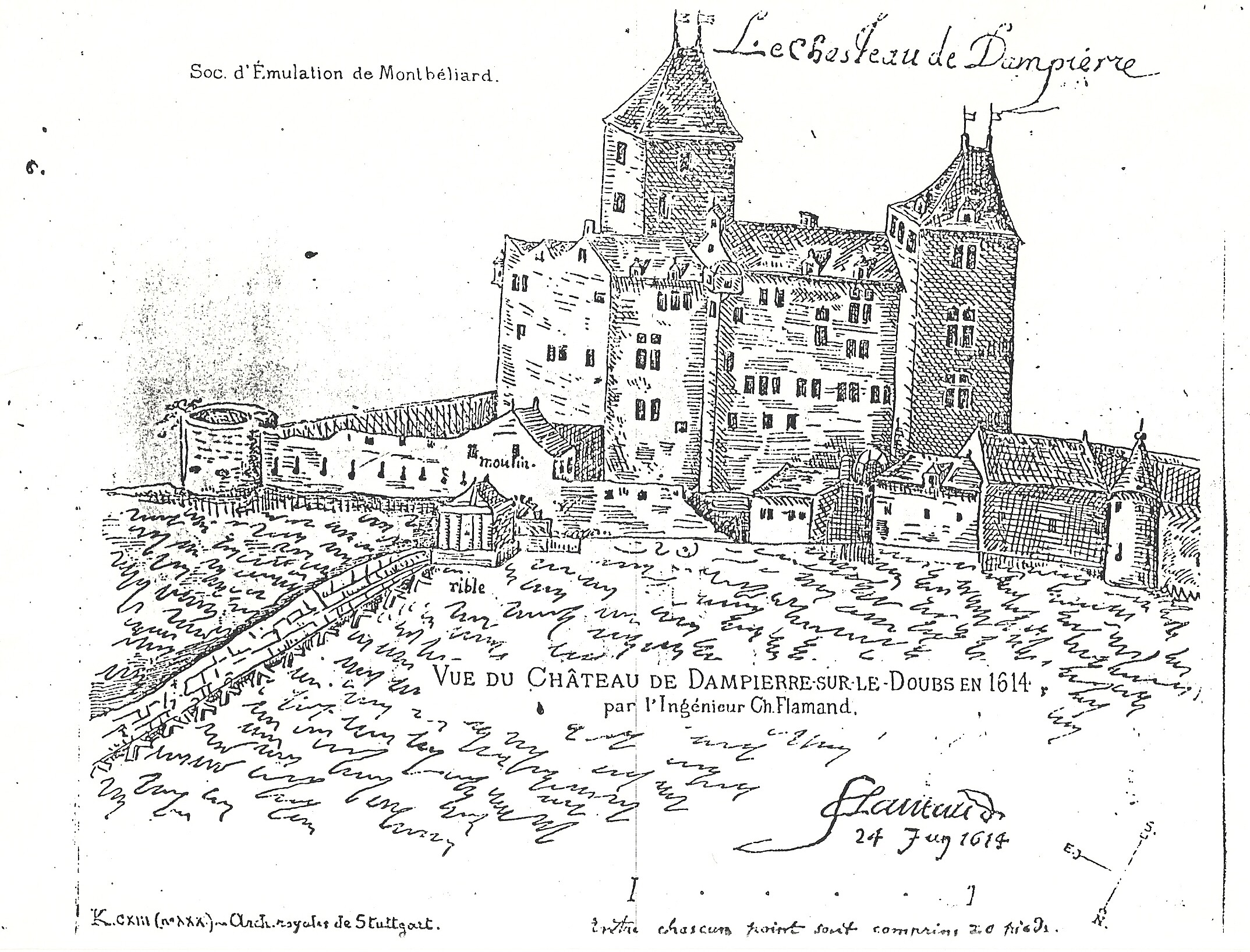 vue du chateau de Dampierre